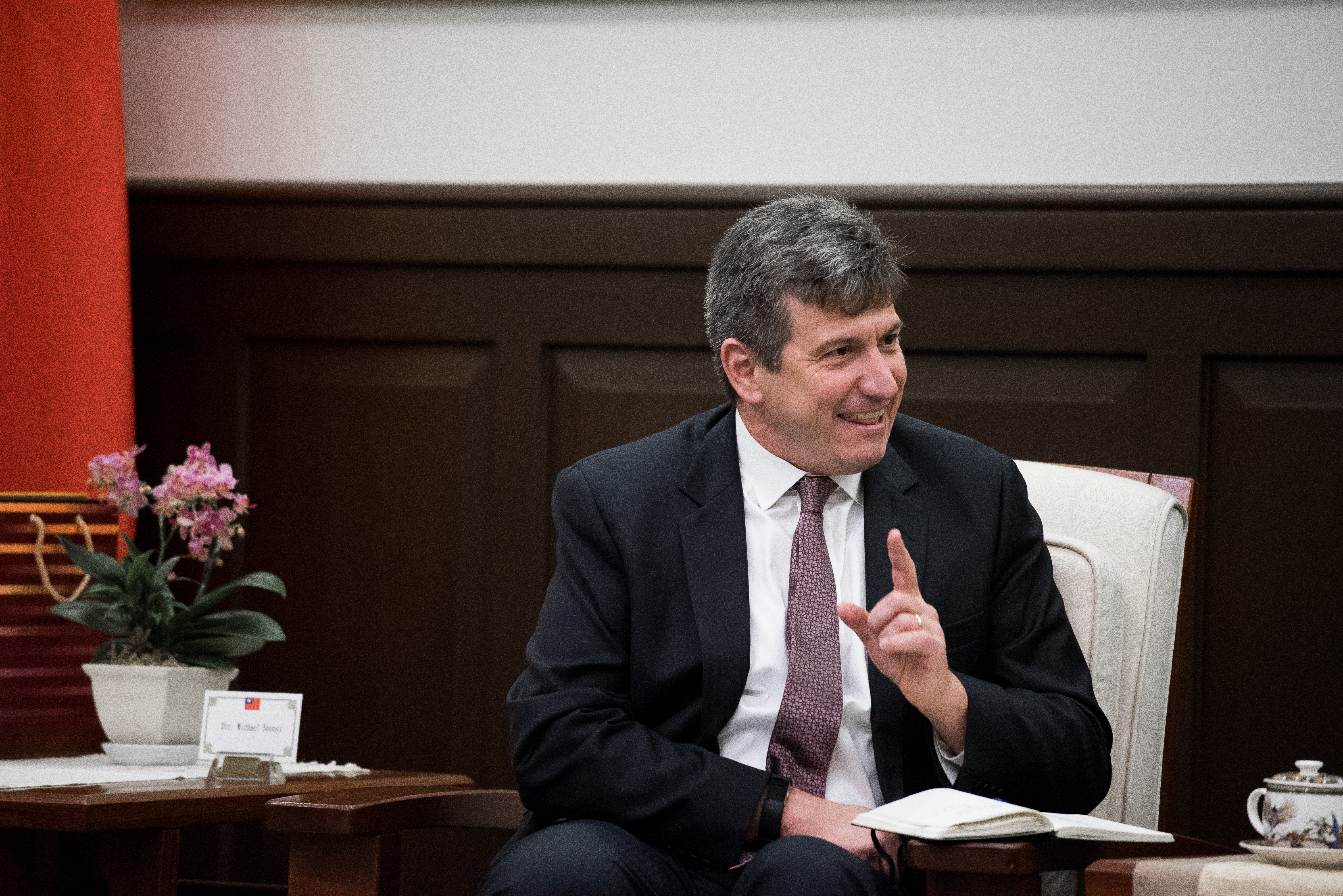 01.09 哈佛大學費正清中心「兩岸事務訪問團」主任宋怡明（Michael Szonyi）